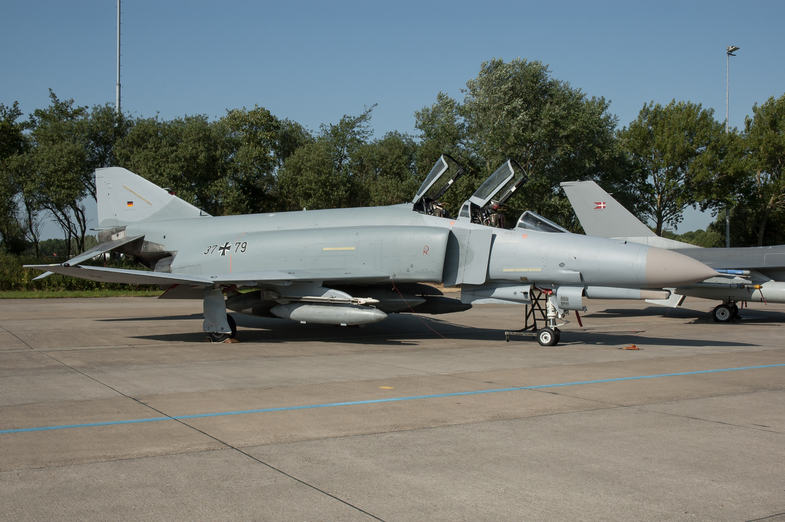 Leeuwarden, June 2006 KLu Open Dagen